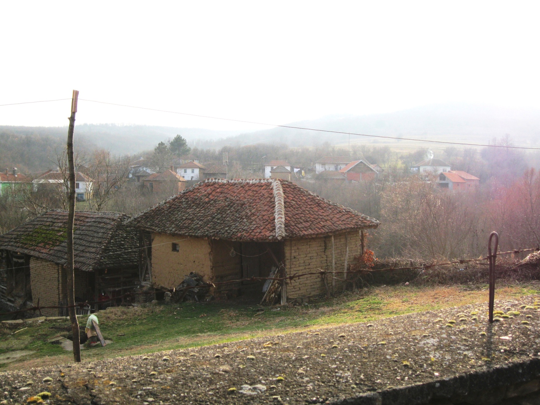 Magaš